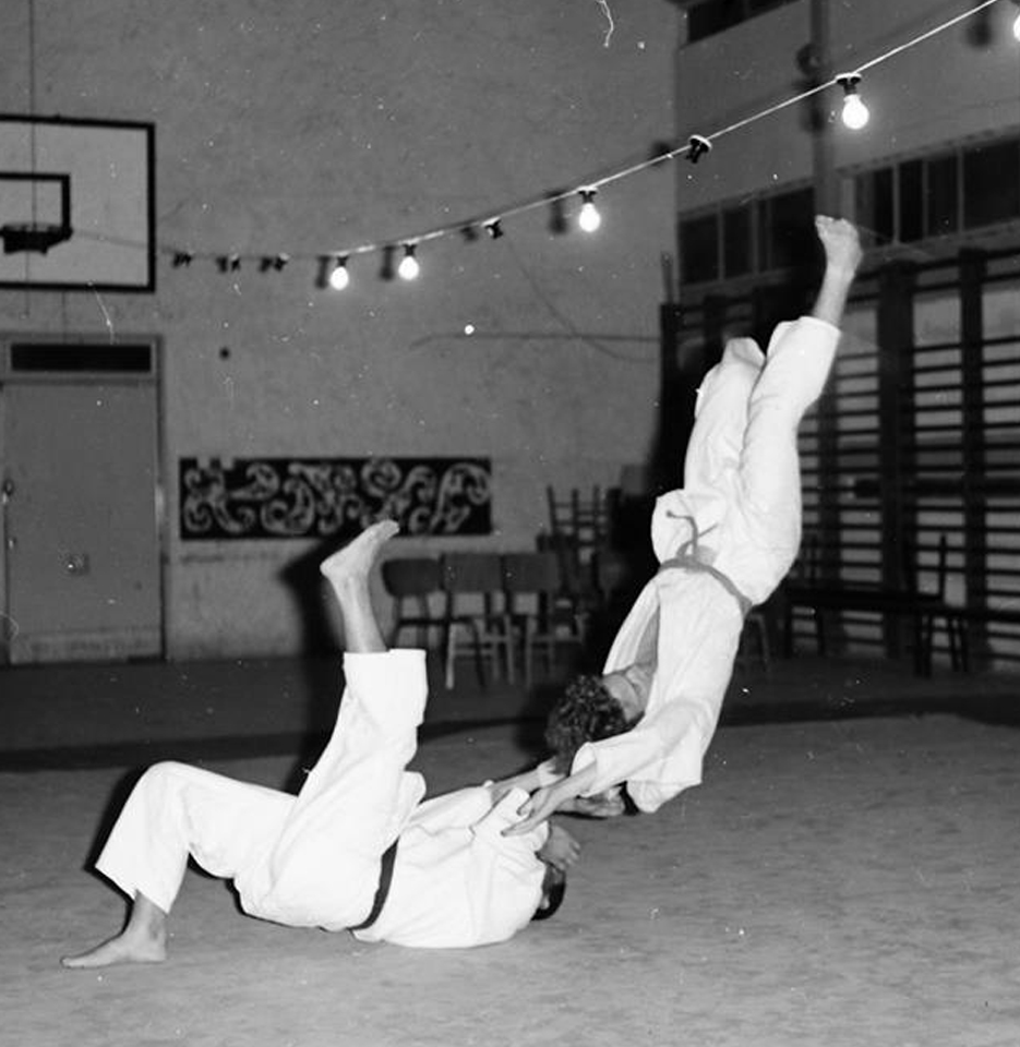 מוריס סמדג'ה בפעולה